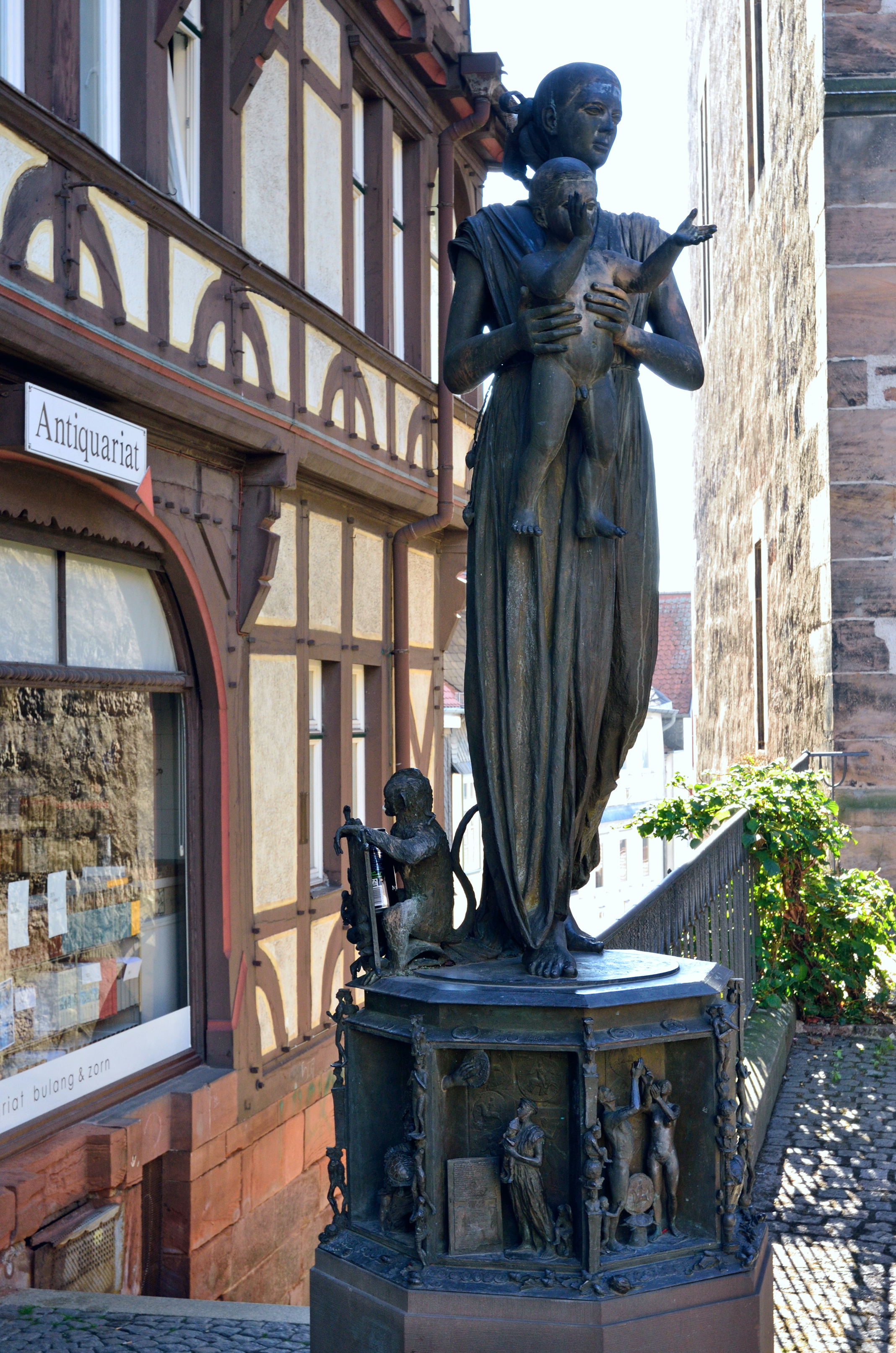 Statue der Sophie von Brabant mit ihrem Sohn Heinrich am Marburger Marktplatz, direkt links neben dem Marburger Rathaus.